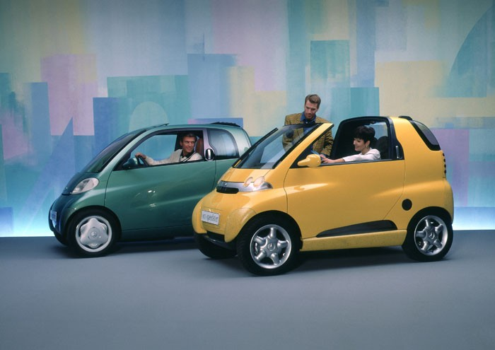 MCC